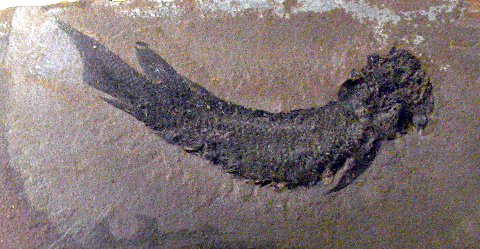 Dipterus valenciennesi SEDGWICK & MURCHINSON, 1829, Devon, Scotland